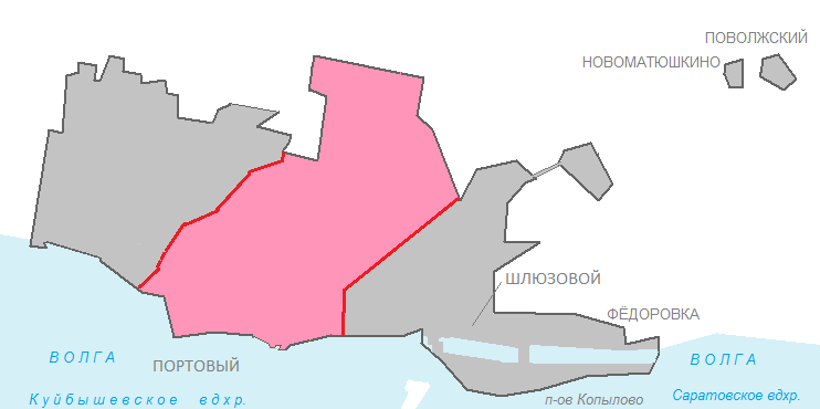 Центральный район Тольятти